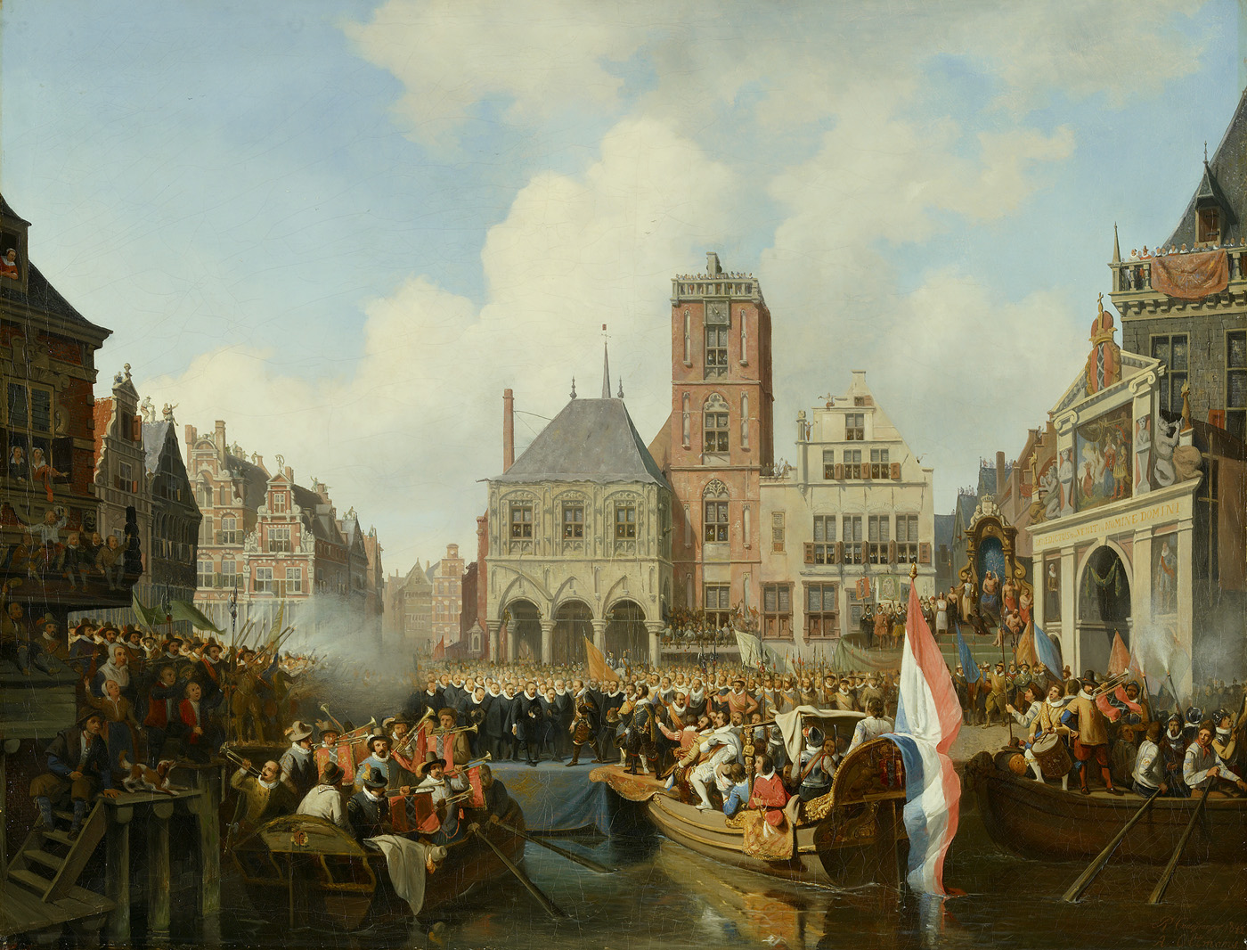 schilderij; tachtigjarige oorlog; krijgsbedrijf; stadsgezicht; stadsgezicht Amsterdam; geschiedenis (iconografie); Dam; Waag; Maurits, prins van Oranje, stadhouder